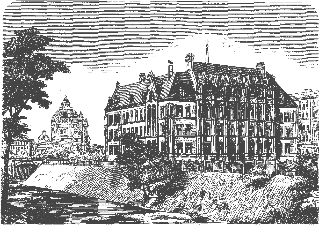 Akademisches Gymnasium in Wien (Friedrich von Schmidt 1866) vor der Wienflusseindeckung